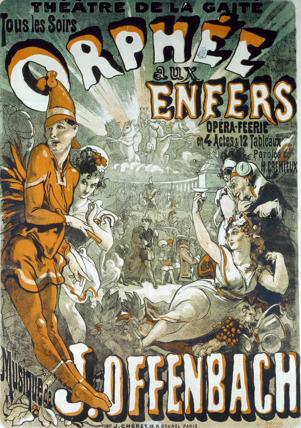 афиша